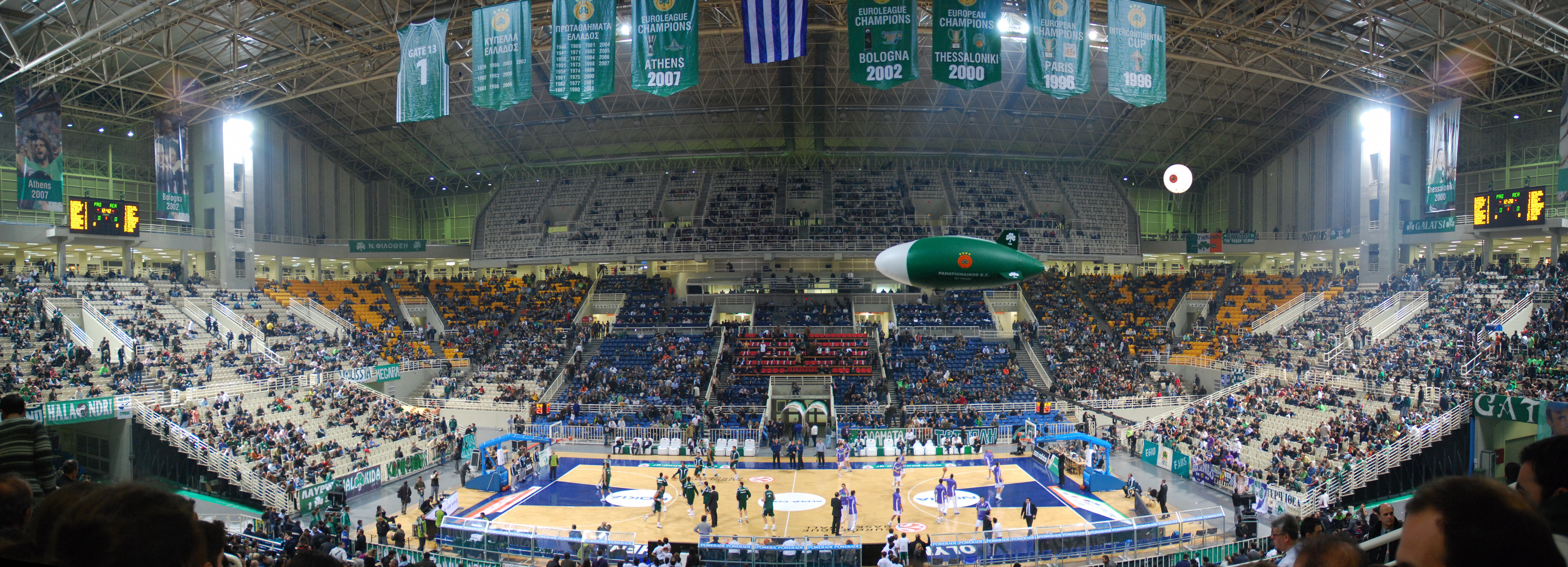 OAKA